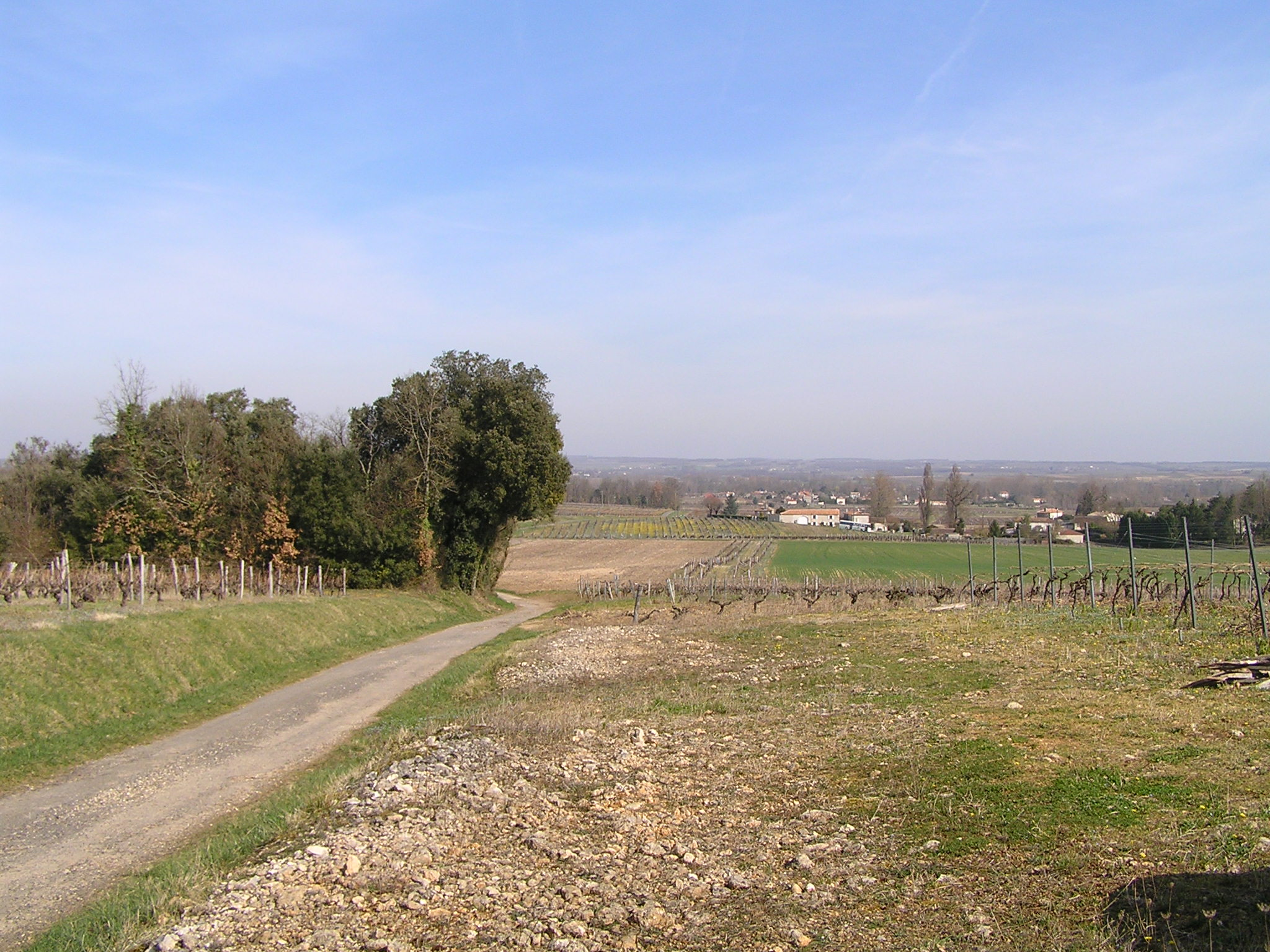 panorama depuis les chaumes boissières de Châteauneuf-sur-Charente site Natura 2000